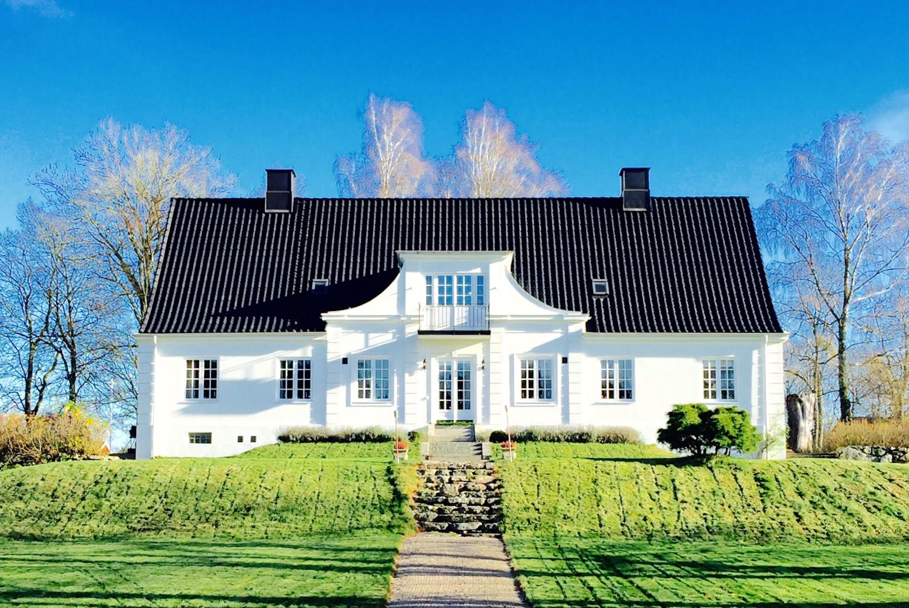 Nuvarande prästgård i Norra Mellby är uppförd i den svenska 1920-tals klassicistiska stilen med sexdelad planlösning. anbyggnaden mäter 22*10 meter och omfattar 11 rum och kök i ett och ett halvt plan om totalt 320 kvm boyta.